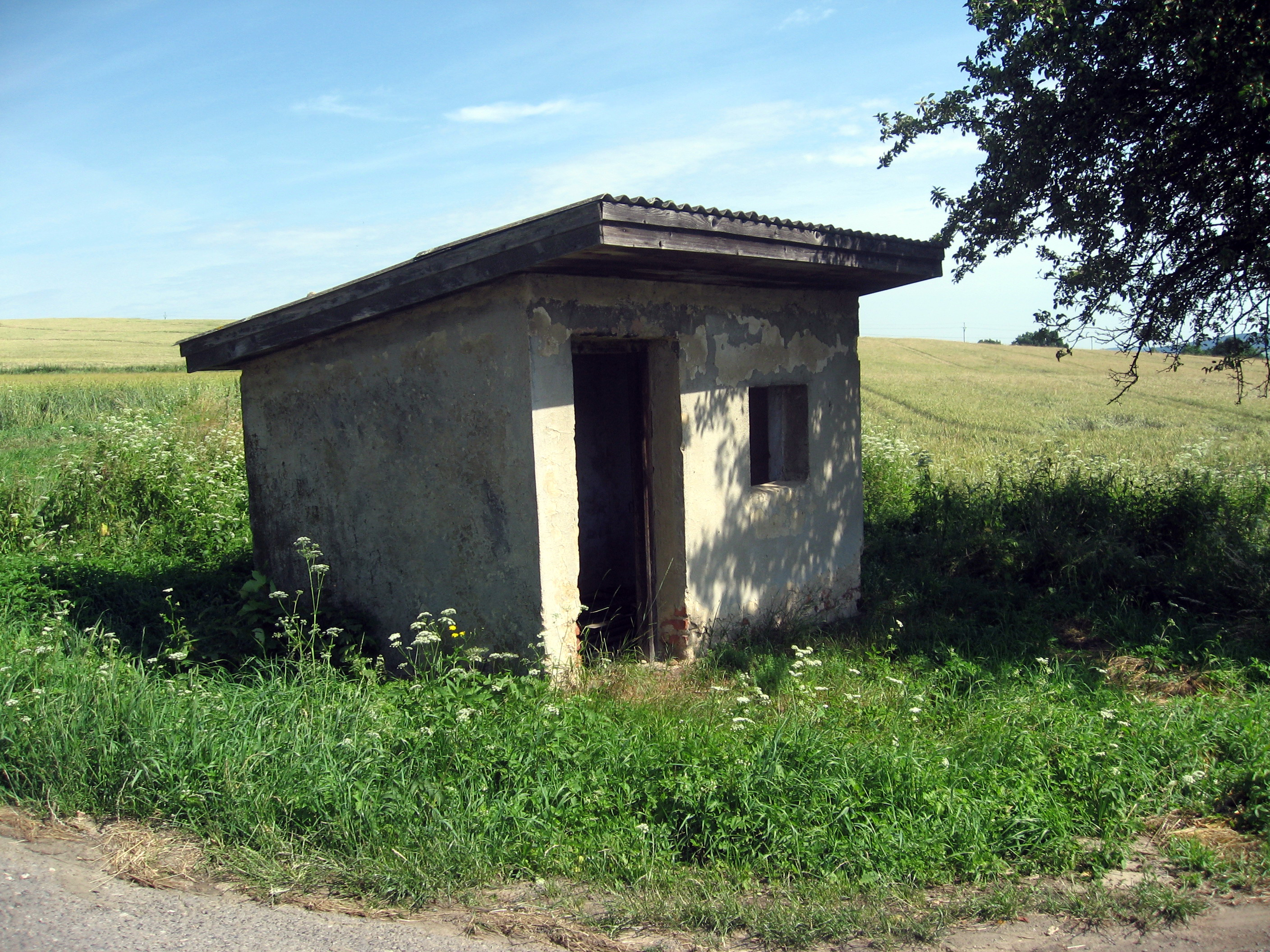 Autobusová zastávka na křižovatce silnic na Jedouchov, Krásnou Horu a Kojkovice